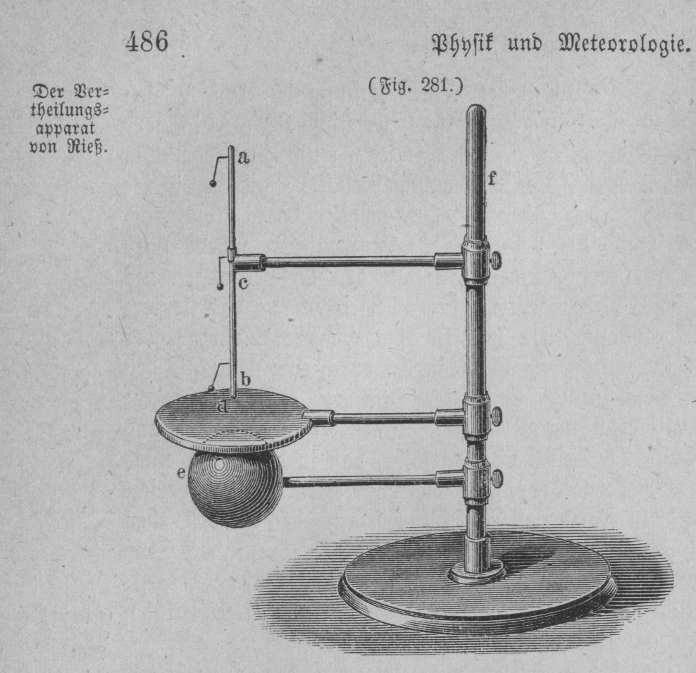 Bild auf Seite 486 des 1873 erschienen Buches „Die gesammten Naturwissenschaften“